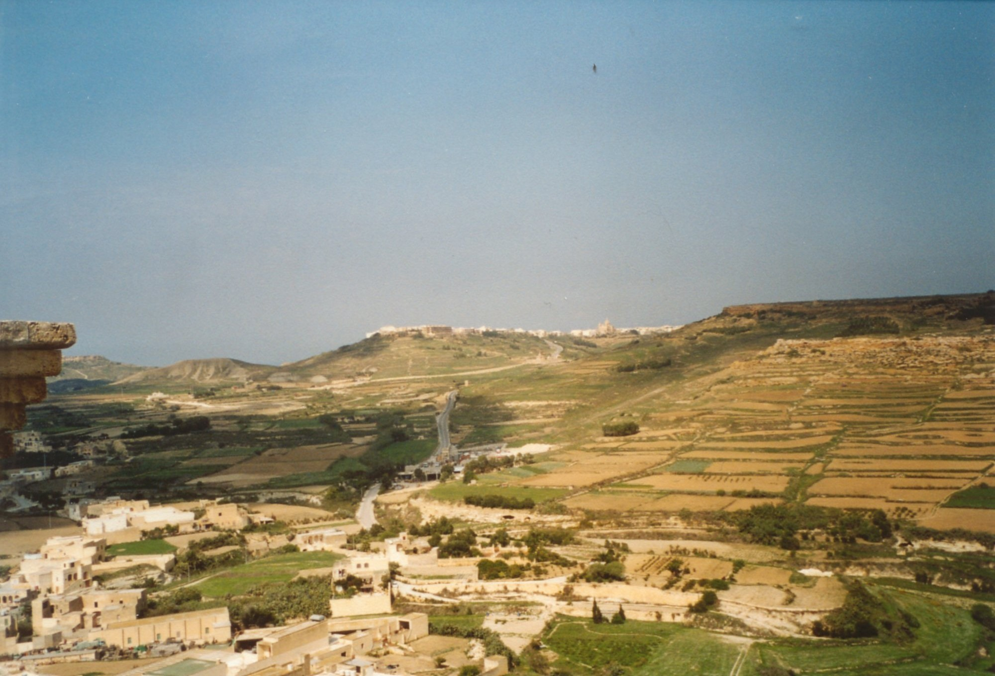 Blick von der Zitadelle Rabat auf die Landschaft der maltesischen Insel Gozo.